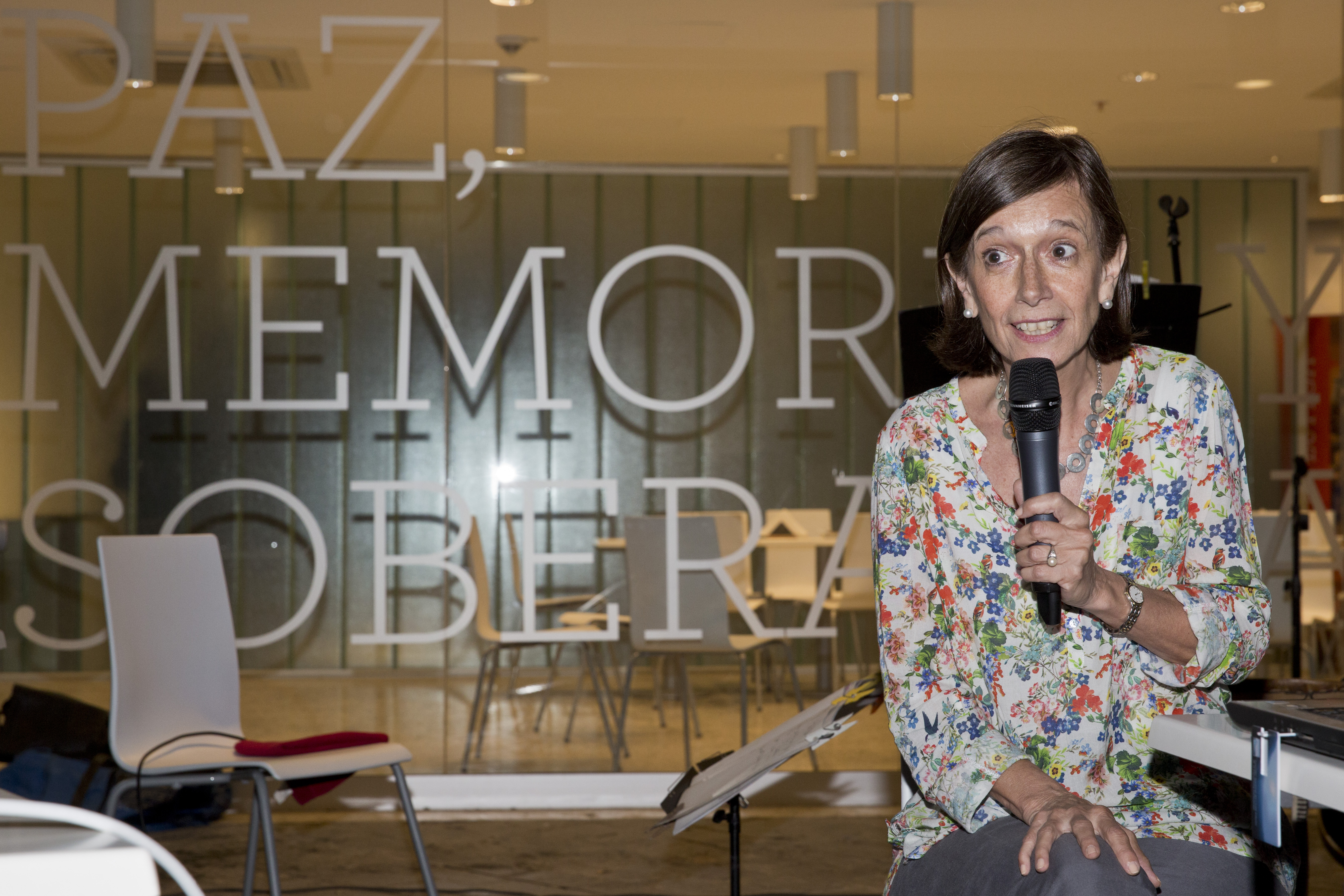 Buenos Aires, 8 de marzo de 2015.- En el marco del Día Internacional de la Mujer, el Museo Malvinas e Islas del Atlántico Sur presentó la muestra de acuarelas “Malvinas, mi casa” que reflejan la vida en Malvinas en el siglo XIX. Las obras están basadas en el “Diario de 1829 en Malvinas” de la cronista María Sáez de Vernet, escrito durante su estadía en las Islas. Además, Marcelo Vernet, descendiente de María Sáez de Vernet, y María Fernanda Cañás, quien fue maestra en Malvinas, brindó una charla sobre las mujeres que cumplieron un rol destacado en la historia de las Islas. Para culminar la velada, se realizó un show musical a cargo del poeta, músico y ex combatiente Martín Raninqueo, quien se presentó junto a Diego Rolón en guitarra y Potolo Abrego en percusión. Foto: Augusto Starita / Ministerio de Cultura de la Nación. Buenos Aires, 8 de marzo de 2015.- En el marco del Día Internacional de la Mujer, el Museo Malvinas e Islas del Atlántico Sur presentó la muestra de acuarelas “Malvinas, mi casa” que reflejan la vida en Malvinas en el siglo XIX. Las obras están basadas en el “Diario de 1829 en Malvinas” de la cronista María Sáez de Vernet, escrito durante su estadía en las Islas. Además, Marcelo Vernet, descendiente de María Sáez de Vernet, y María Fernanda Cañás, quien fue maestra en Malvinas, brindó una charla sobre las mujeres que cumplieron un rol destacado en la historia de las Islas. Para culminar la velada, se realizó un show musical a cargo del poeta, músico y ex combatiente Martín Raninqueo, quien se presentó junto a Diego Rolón en guitarra y Potolo Abrego en percusión.